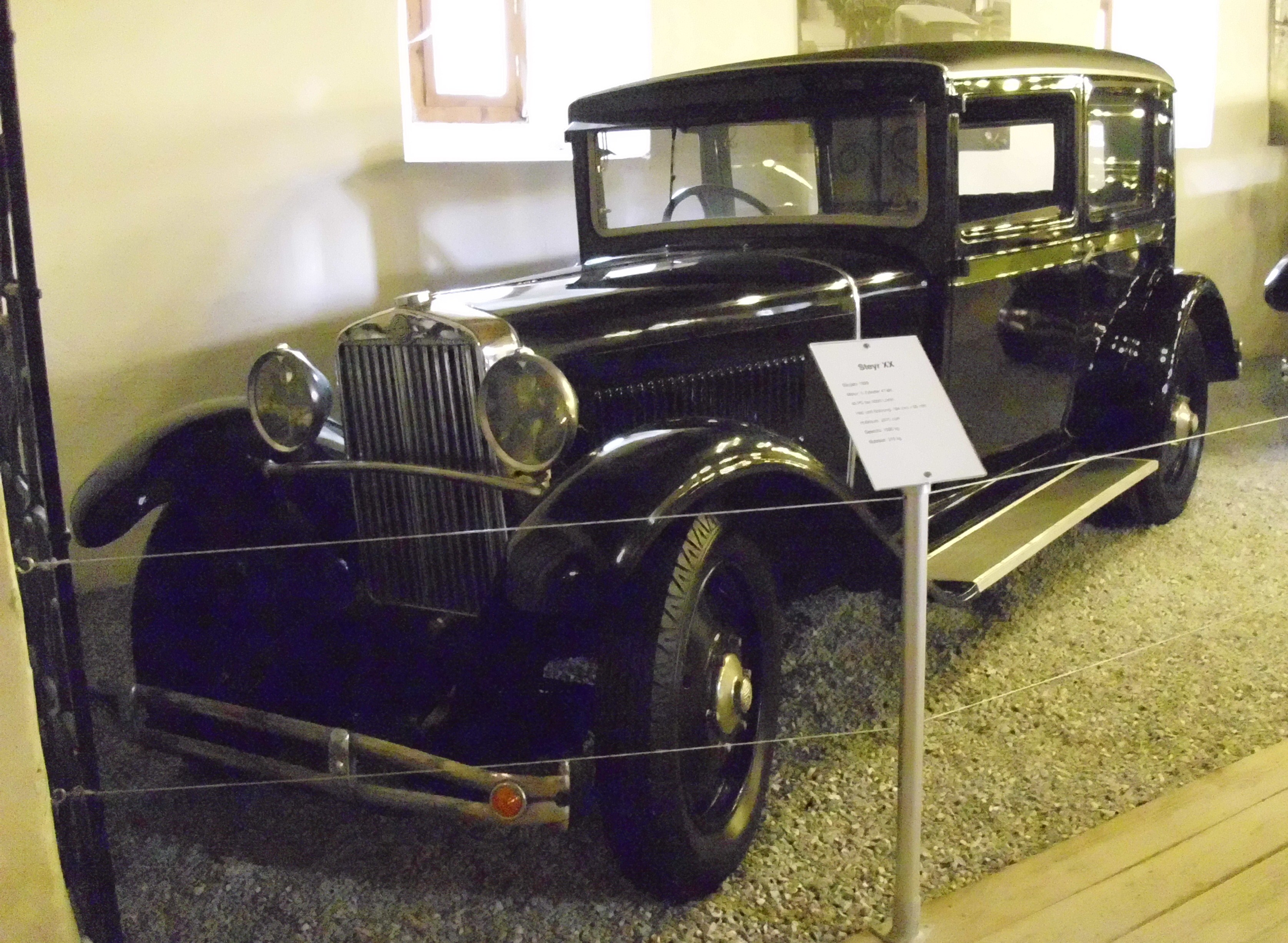 Steyr Typ XX 1929 im Automobilmuseum der Burg Strechau